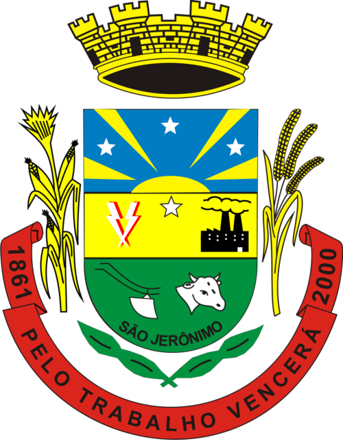 Brasão do Município de São Jerônimo, no Estado do Rio Grande do Sul.